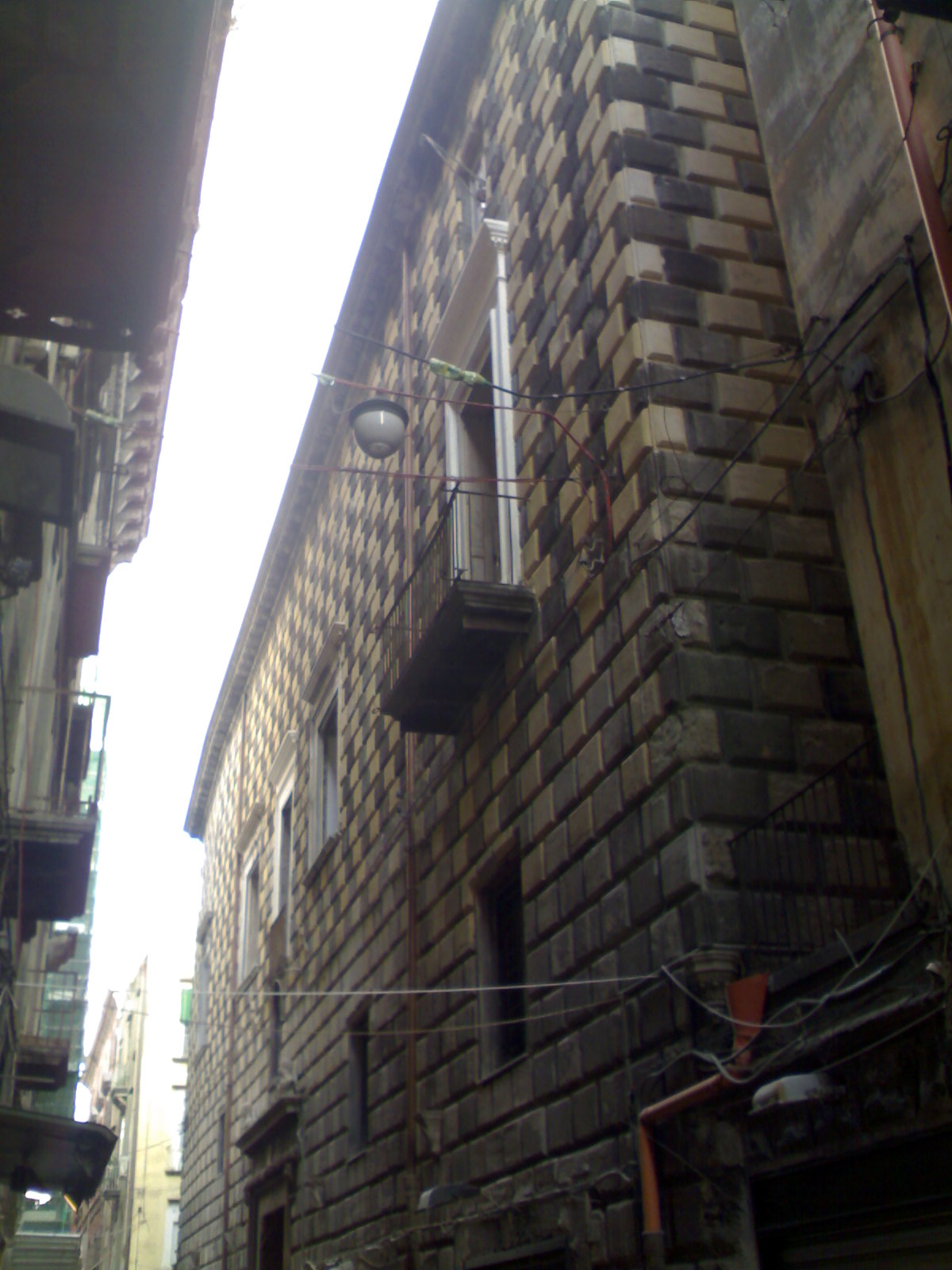 Palazzo Diomede Carafa (Napoli)